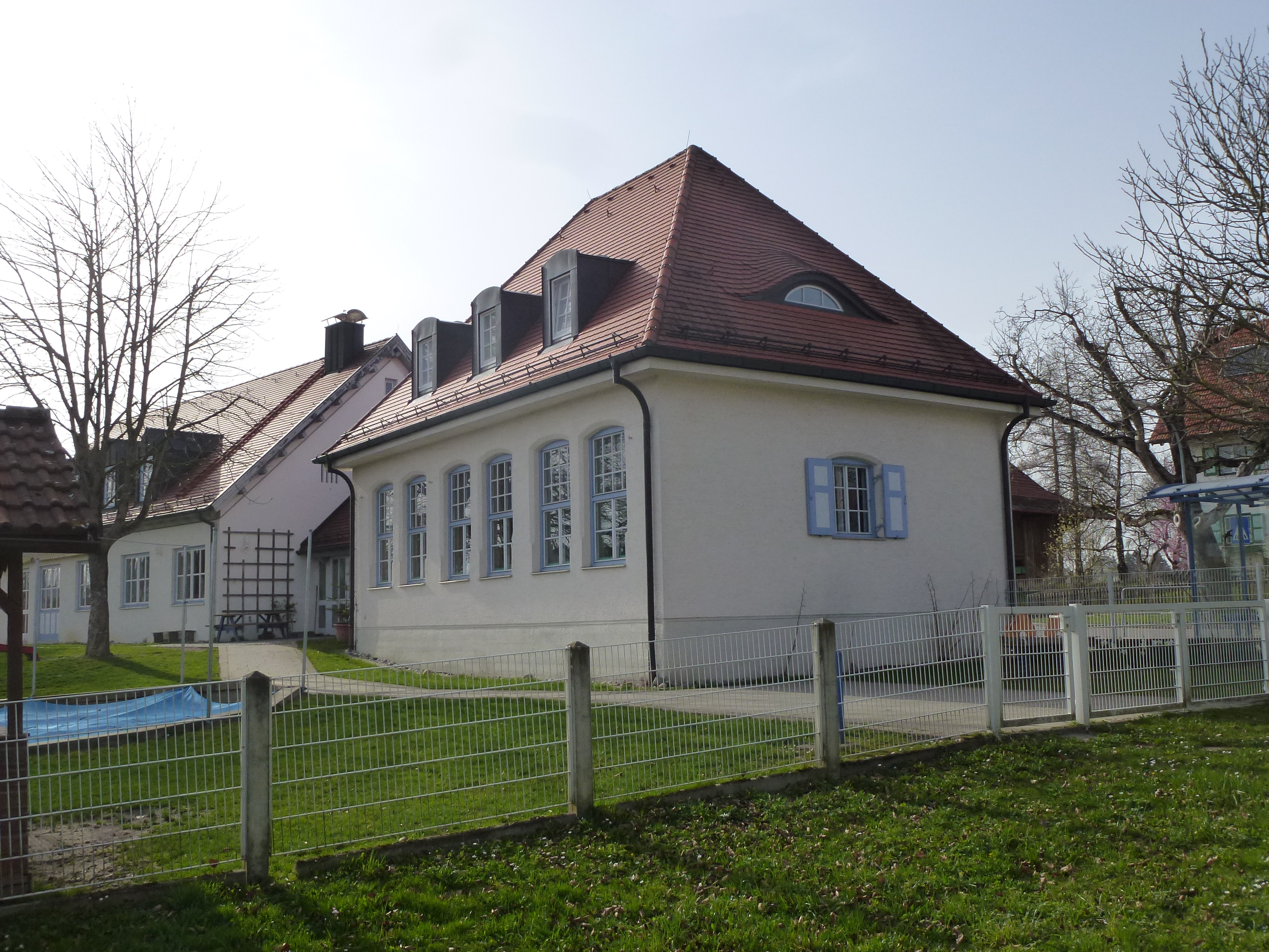 Alling-Biburg, Ammerseestr.1: ehemaliges Schulhaus, Ansicht von SO